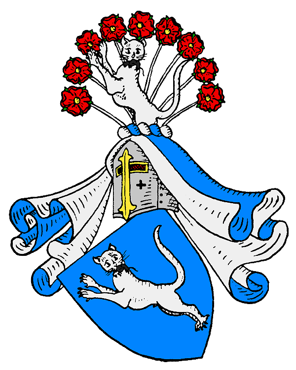 Stemma originale della Famiglia De Katt